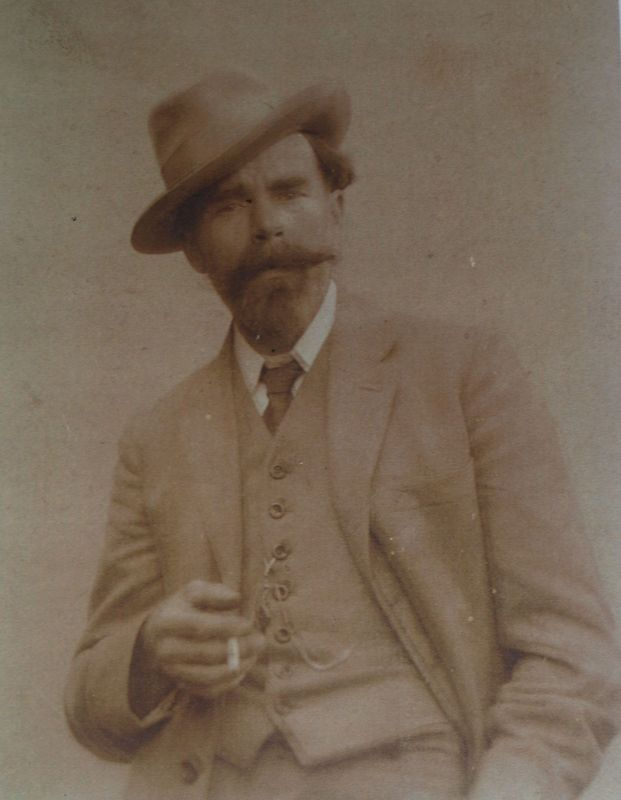 Jan Lev malíř (1874-1935) v roce 1915